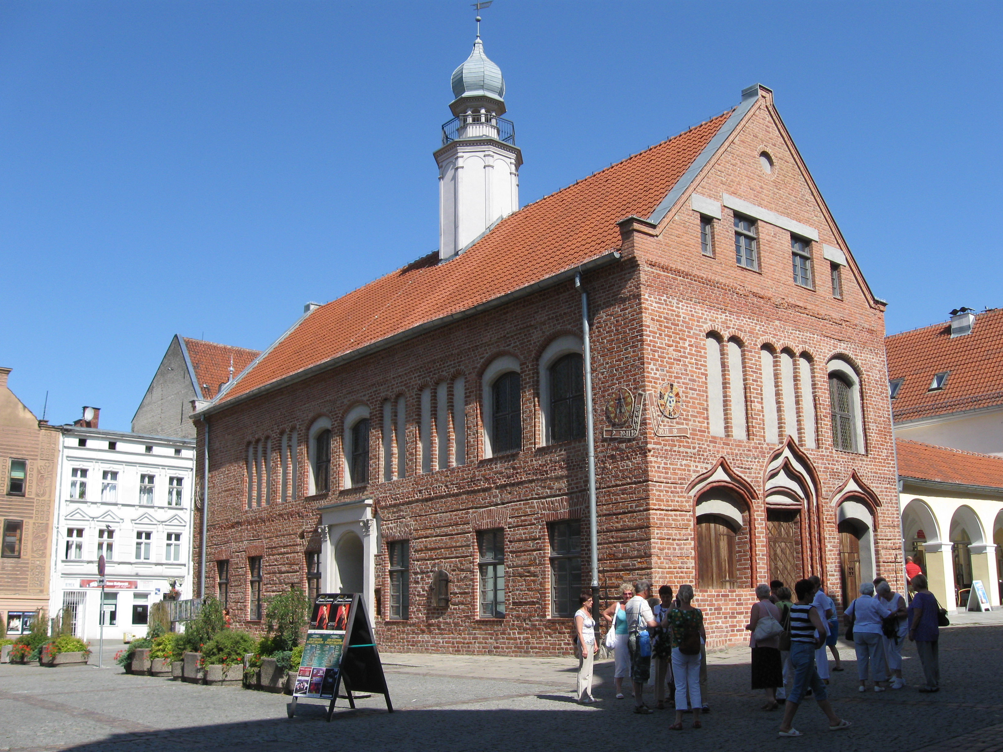 Olsztyn - Stary Ratusz.